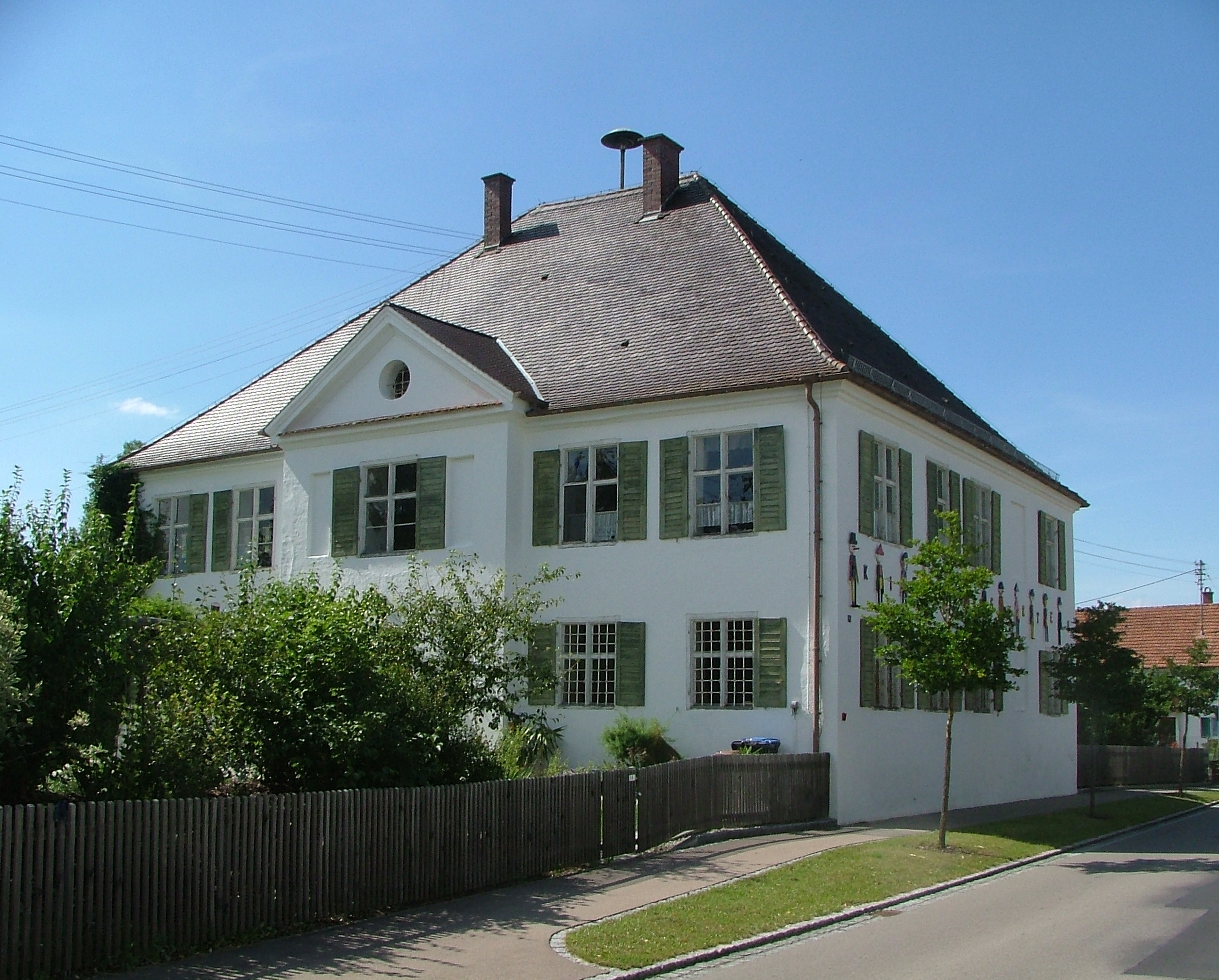 Pfarrhof in Attenhausen, Ortsteil von Sontheim (Schwaben)